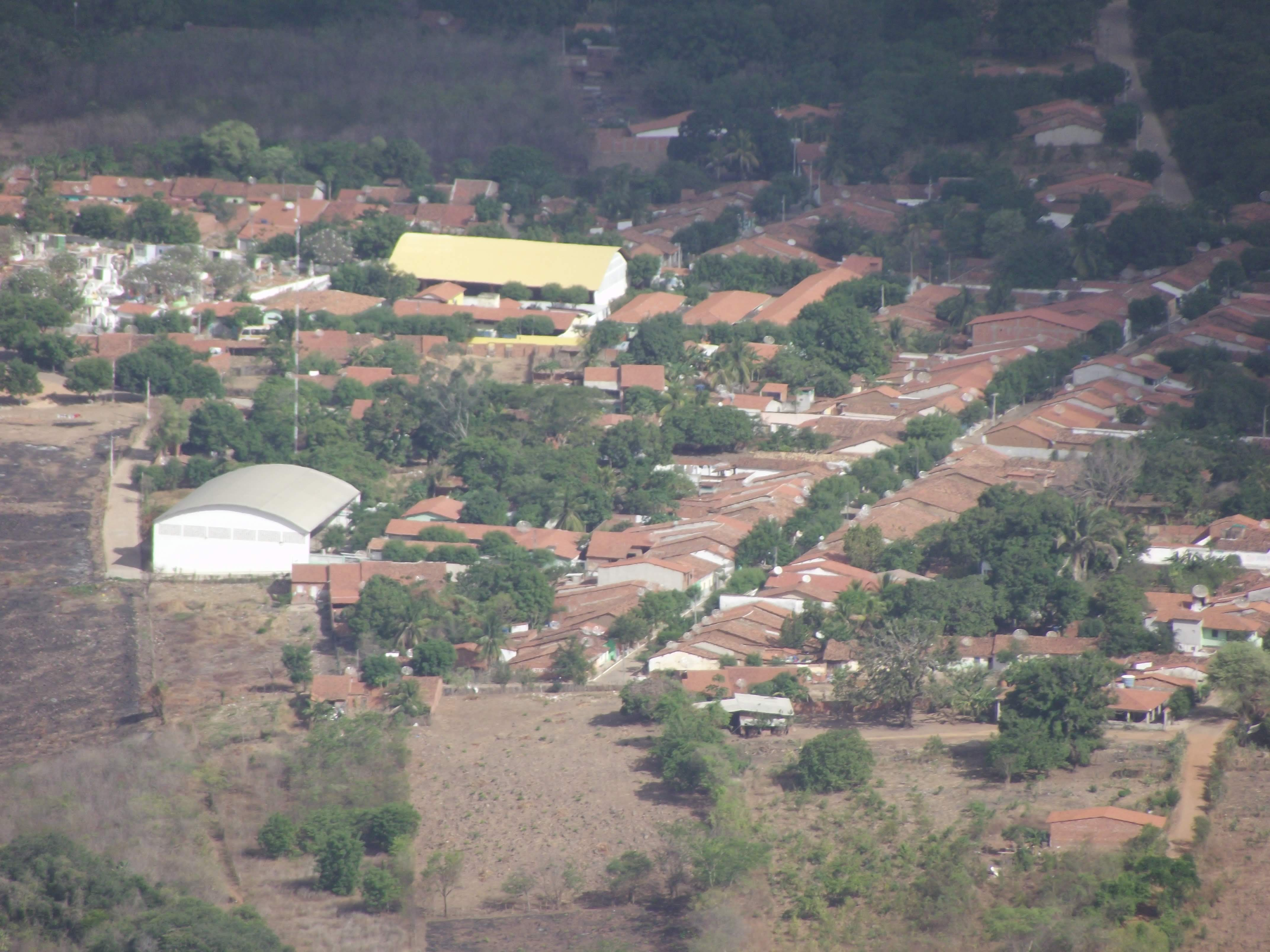 Vista aérea de Oiticicas